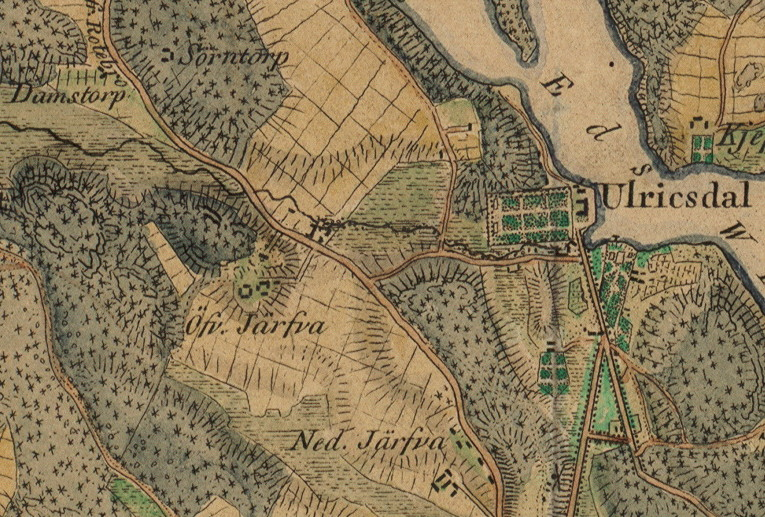 Del av Karta öfver Belägenheten omkring Stockholm / utgifven af W. M. Carpelan 1817 visande Ulricsdal, Sörntorp, Damstorp